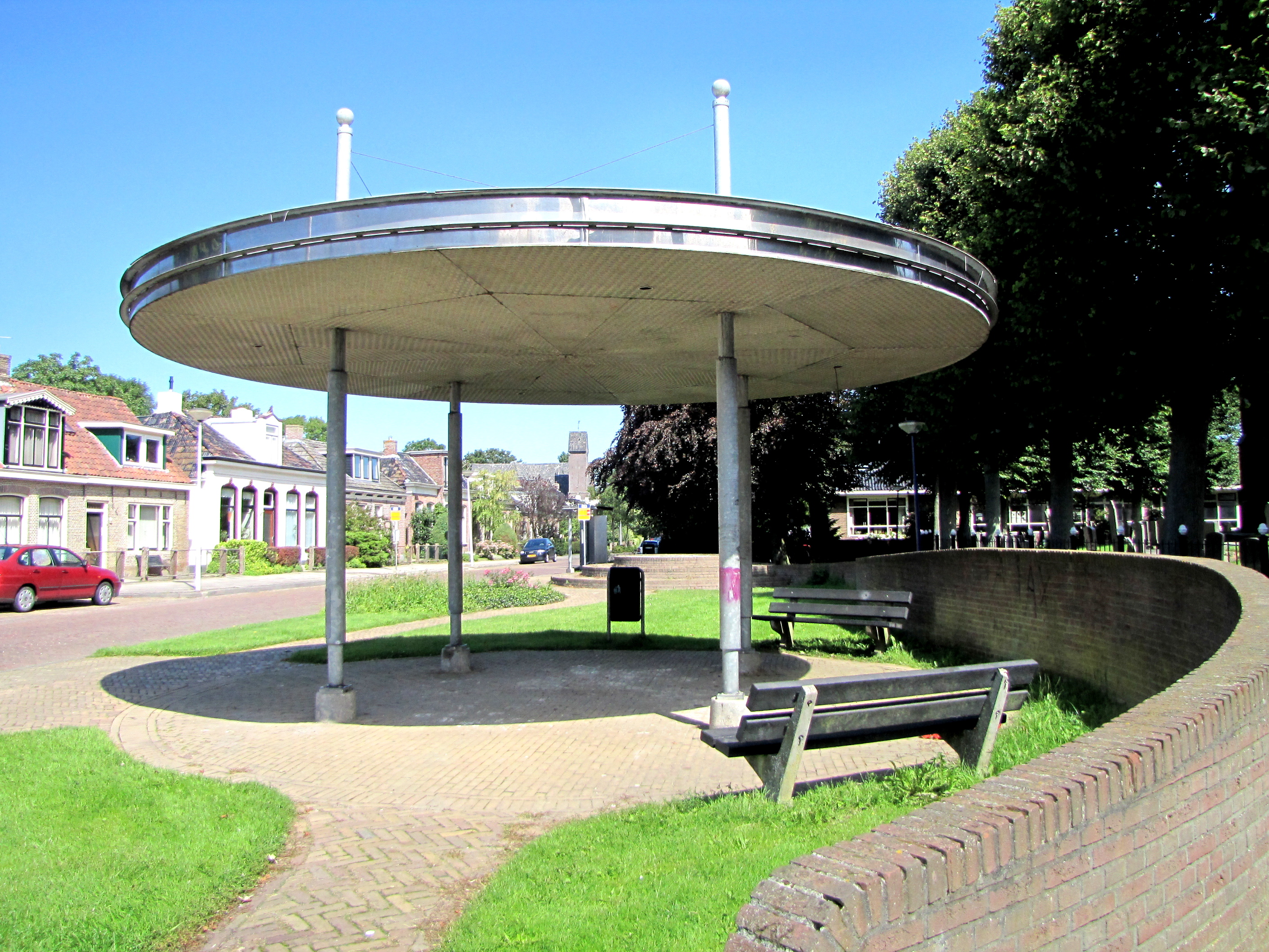 Sexbierum